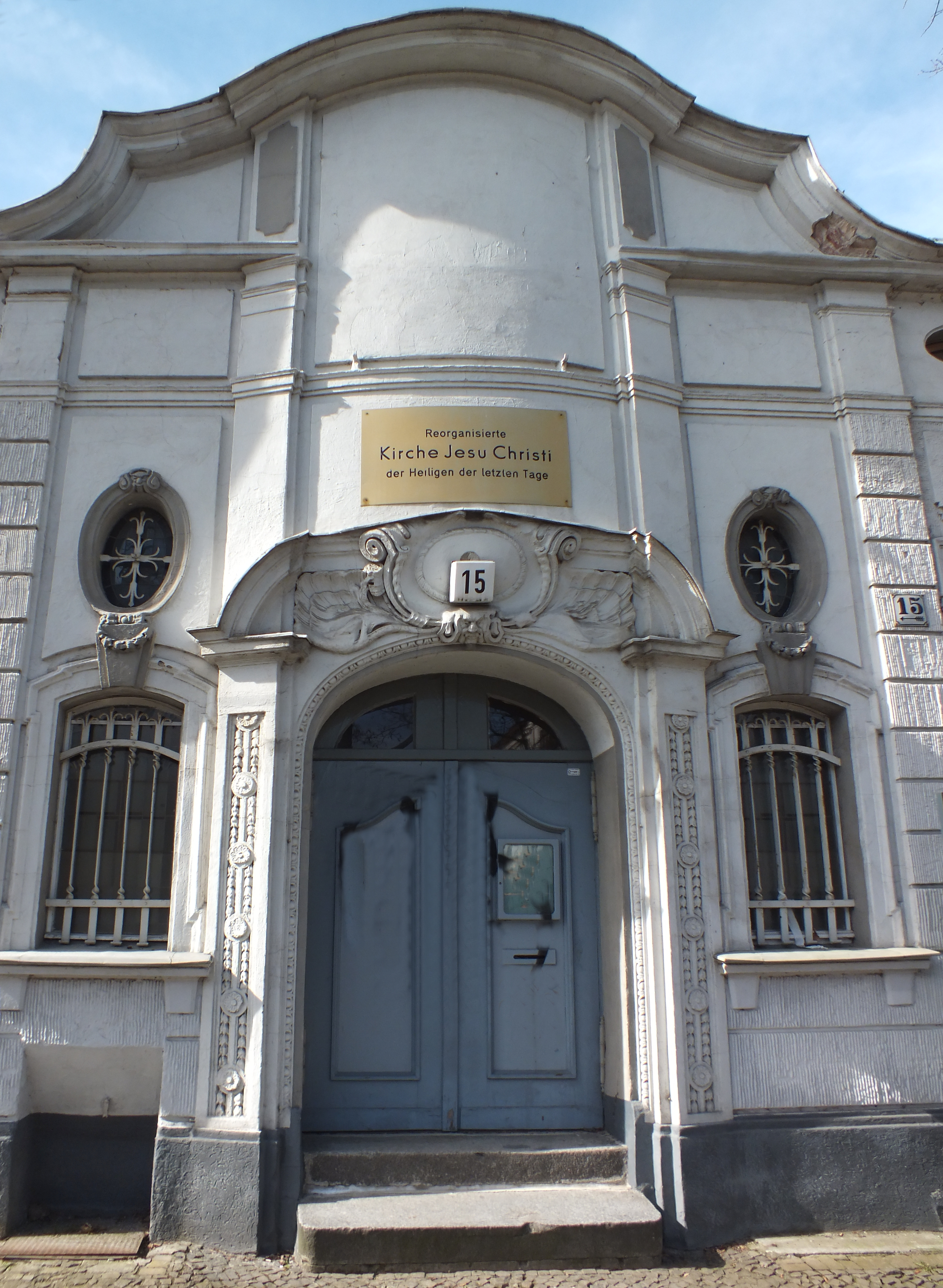 Fontanepromenade 15 in Kreuzberg; Schmierereien an der Fassade digital entfernt